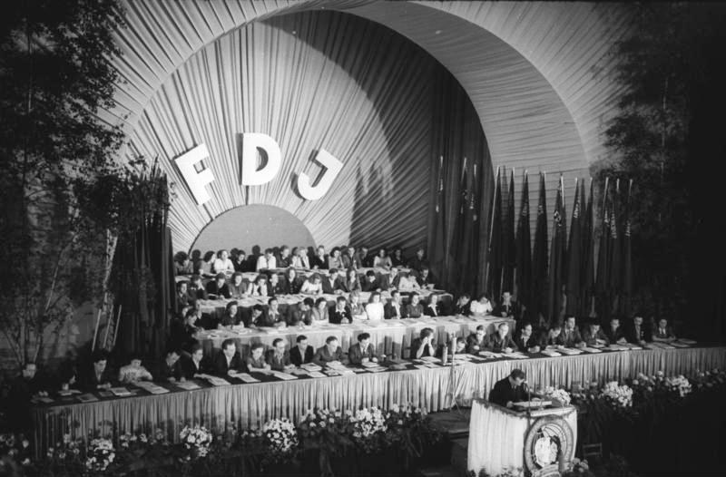 Leipzig, III. FDJ-Parlament, Eröffnung ADN-ZB Blunck 1.6.1949 Leipzig: III. Parlament der FDJ Eröffnung durch den Vorsitzenden des Zentralrates der FDJ, Erich Honecker. Abgebildete Personen: Honecker, Erich: Staatsratsvorsitzender, Generalsekretär des ZK der SED, DDR (PND 118553399)